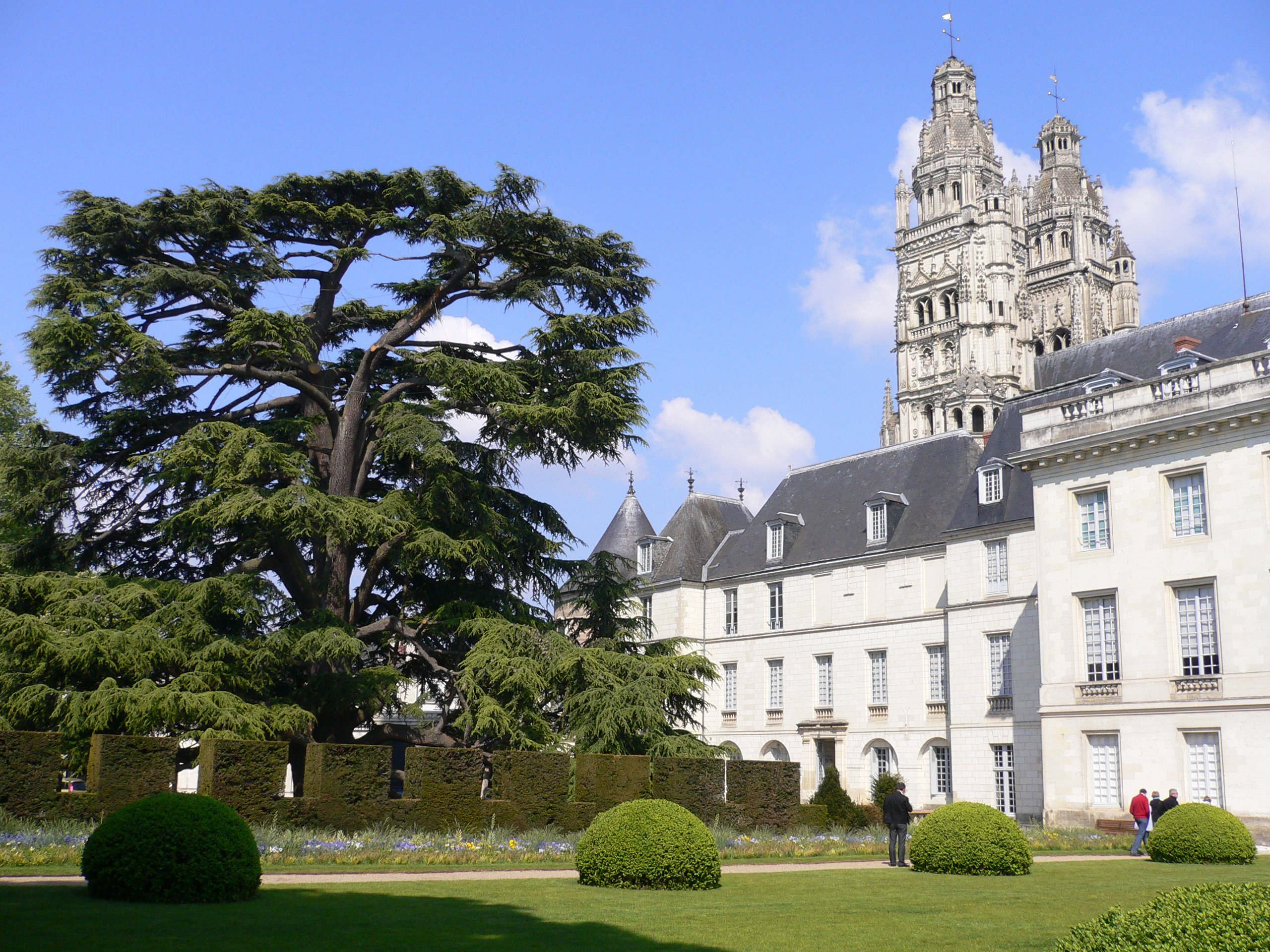 Vu du jardin (n7). .